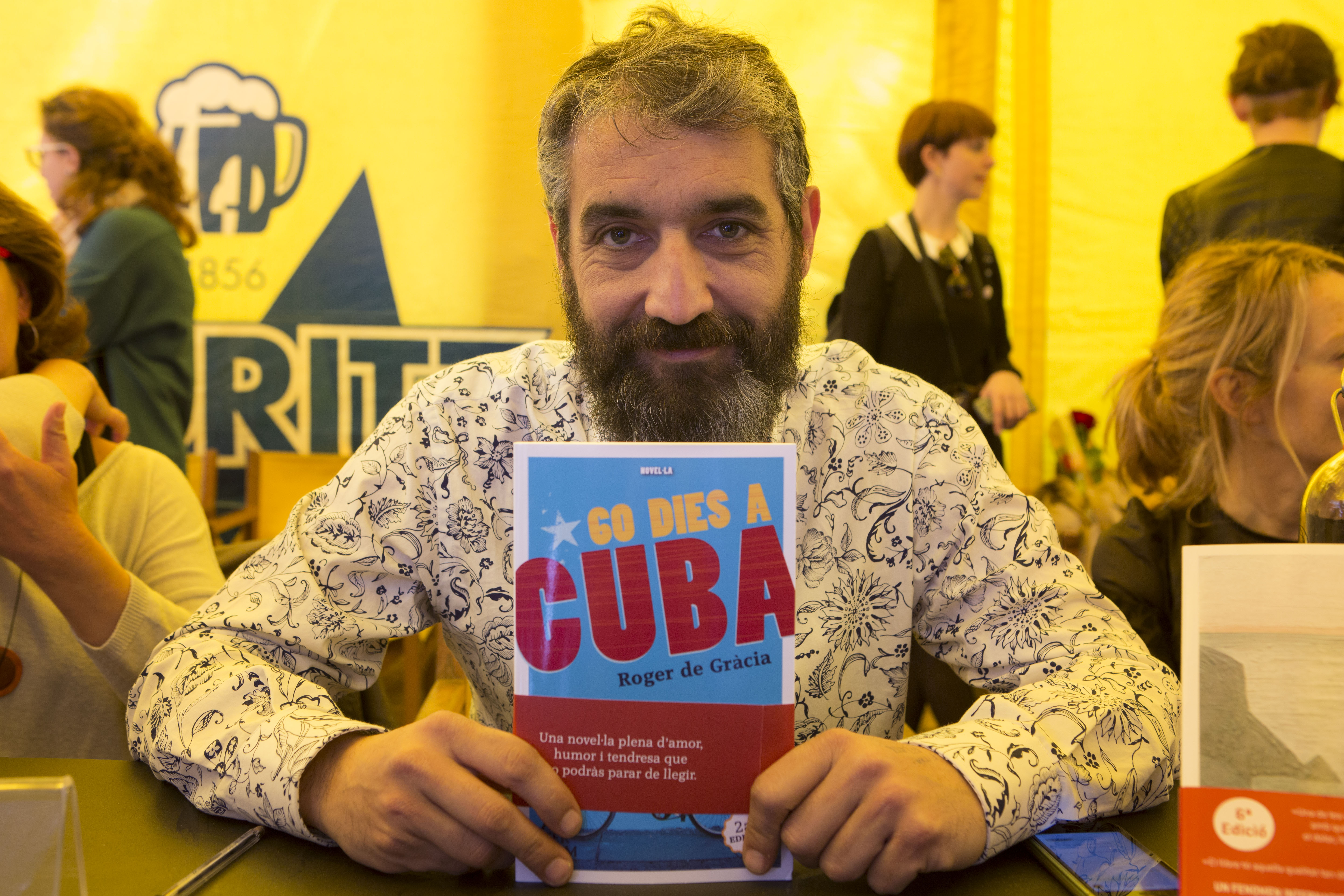 El periodista Roger de Gràcia en Sant Jordi.